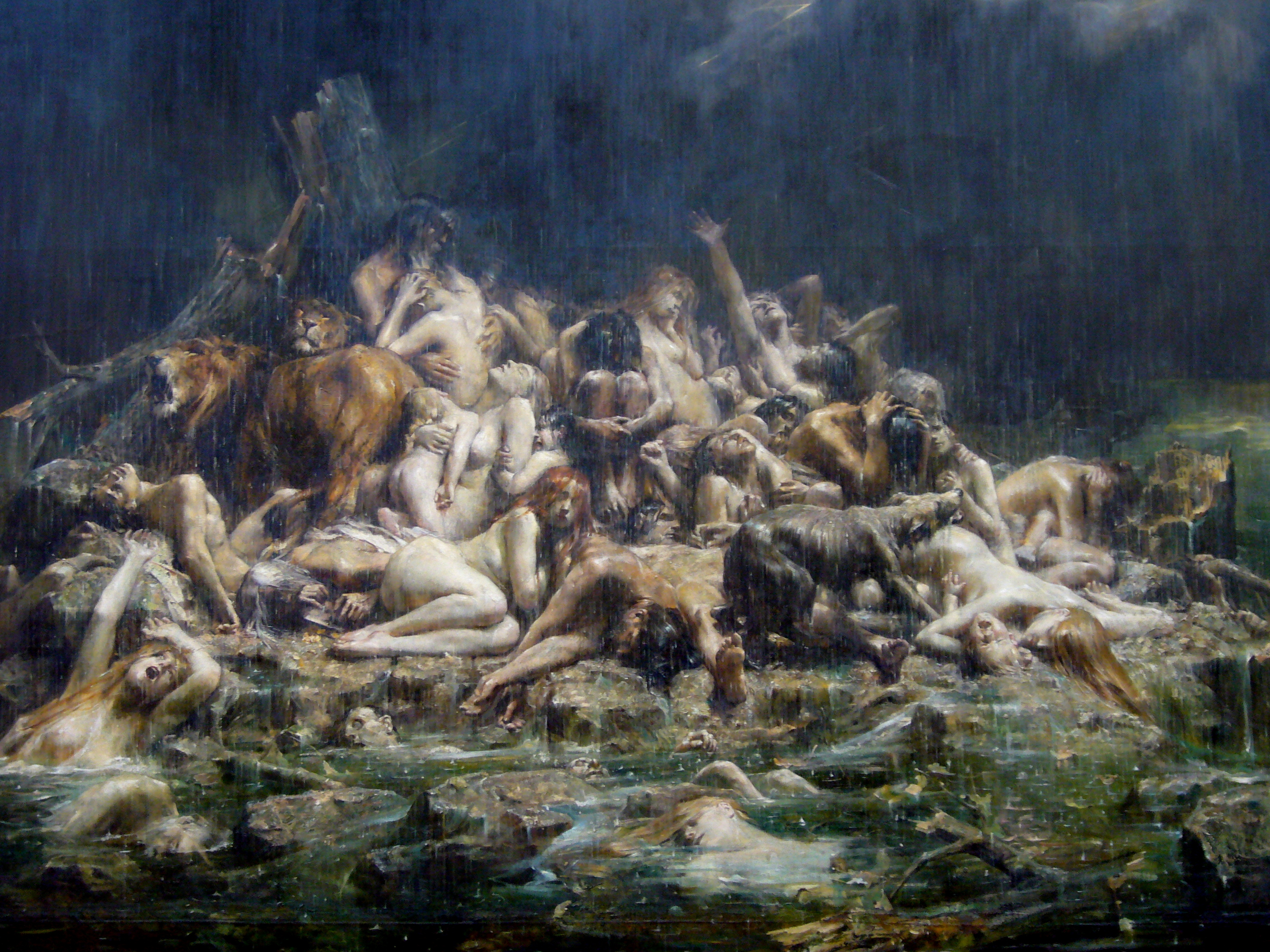 Le déluge de Noe et les compagnons